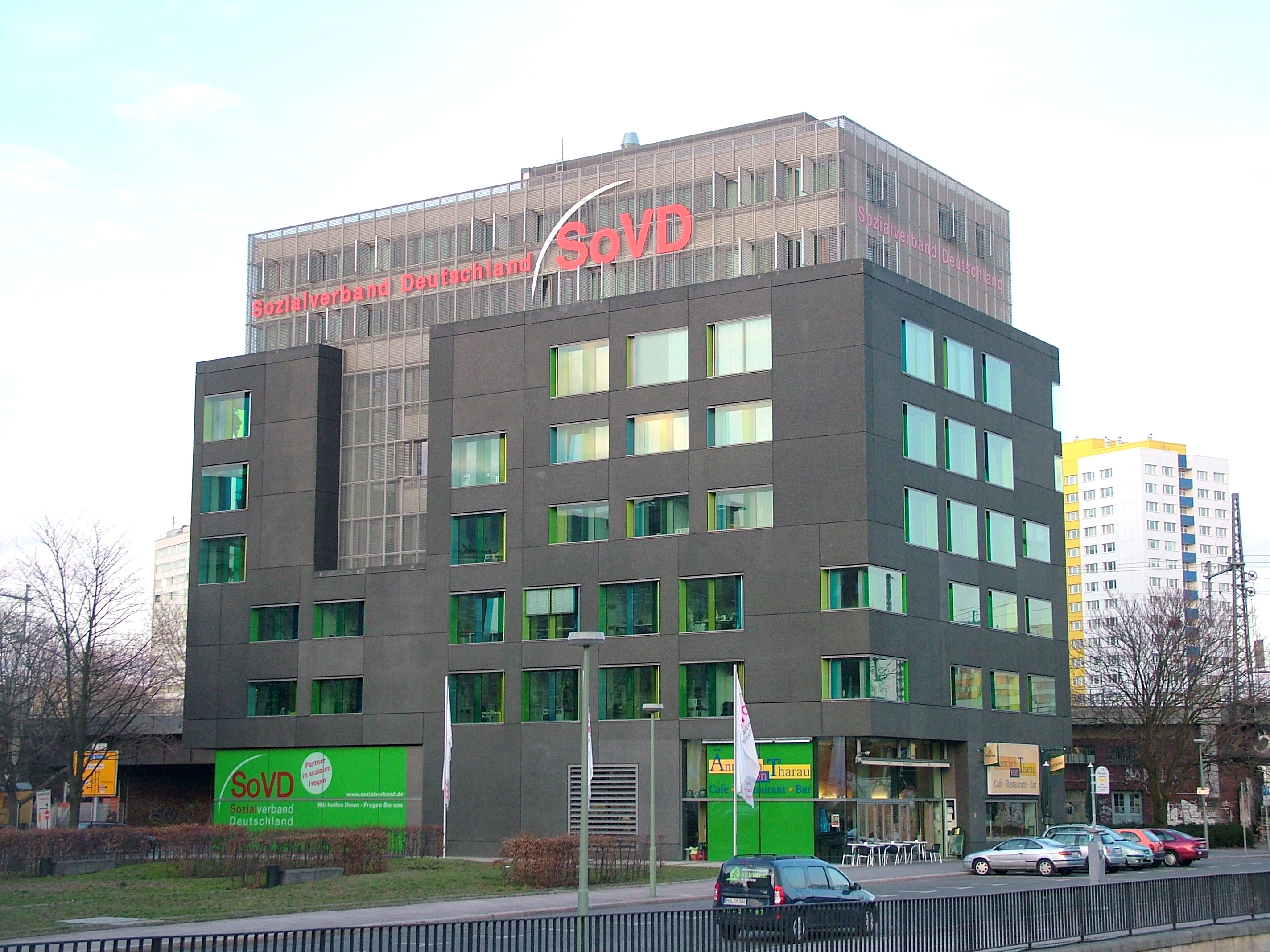 Sozialverband Deutschland, Berlin.